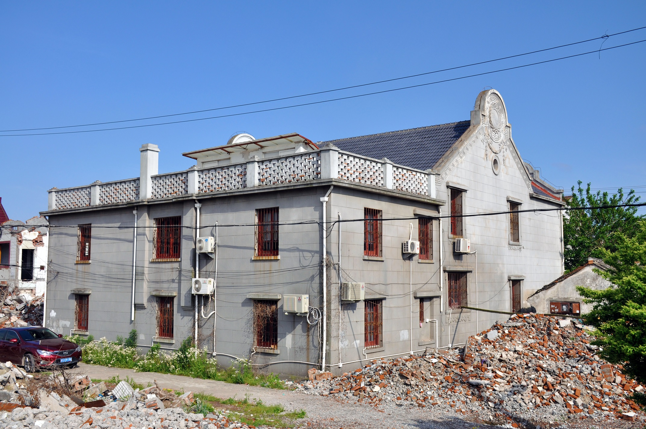 中文（中国大陆）: 龚路居民委员会 龚路东街20号